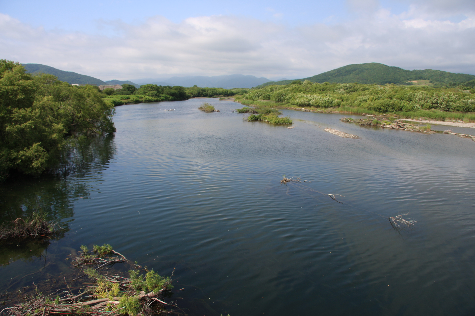 日高幌別川（東幌別） 幌別橋より望む